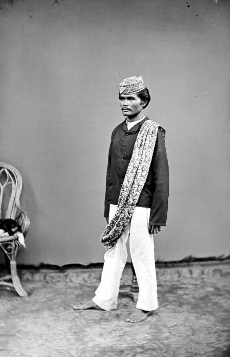 Negatief. Djongos, Makassar, Zuid-Celebes, 1913